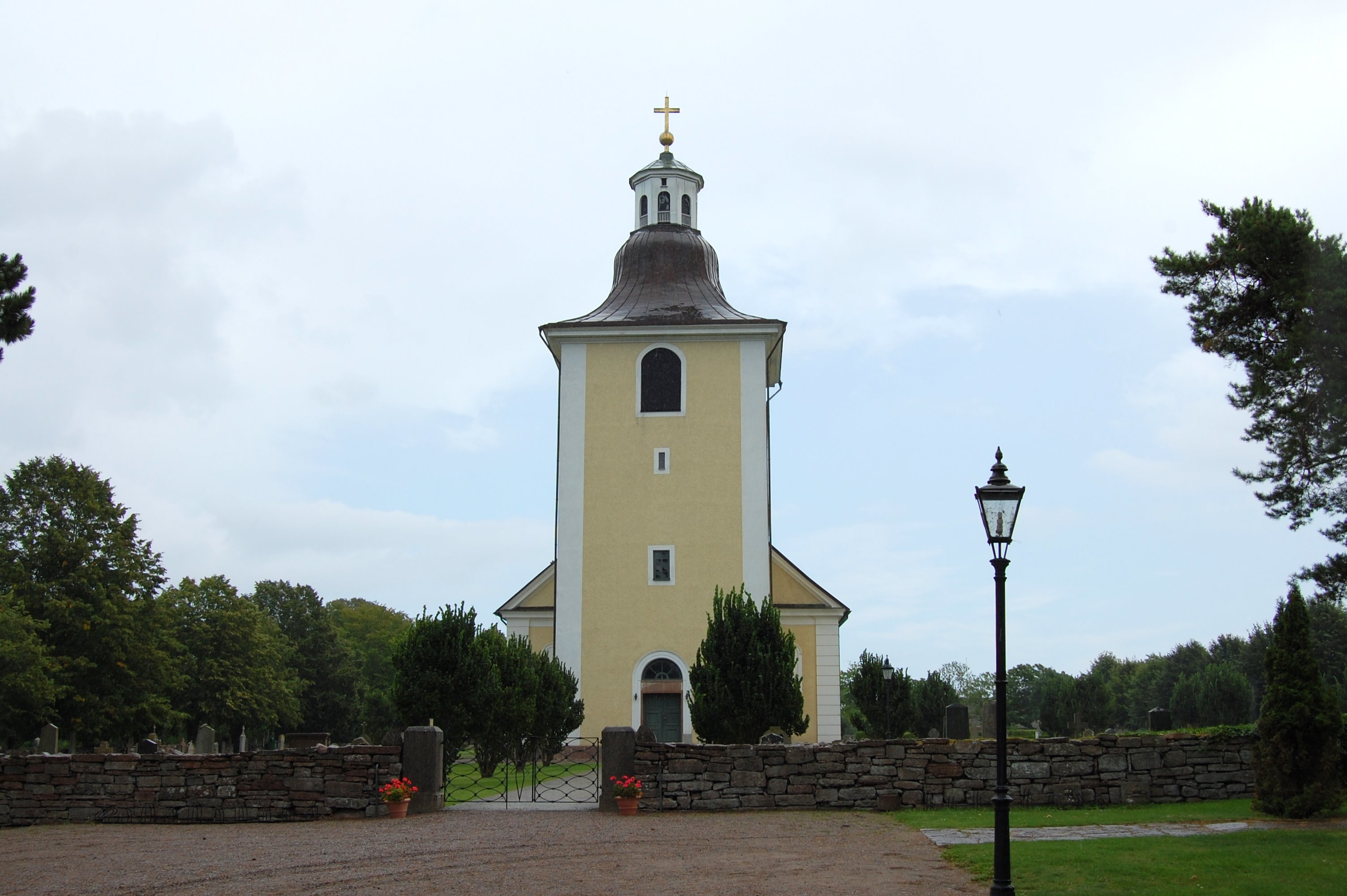 Kirche von Högby, Kirchturm, Westseite